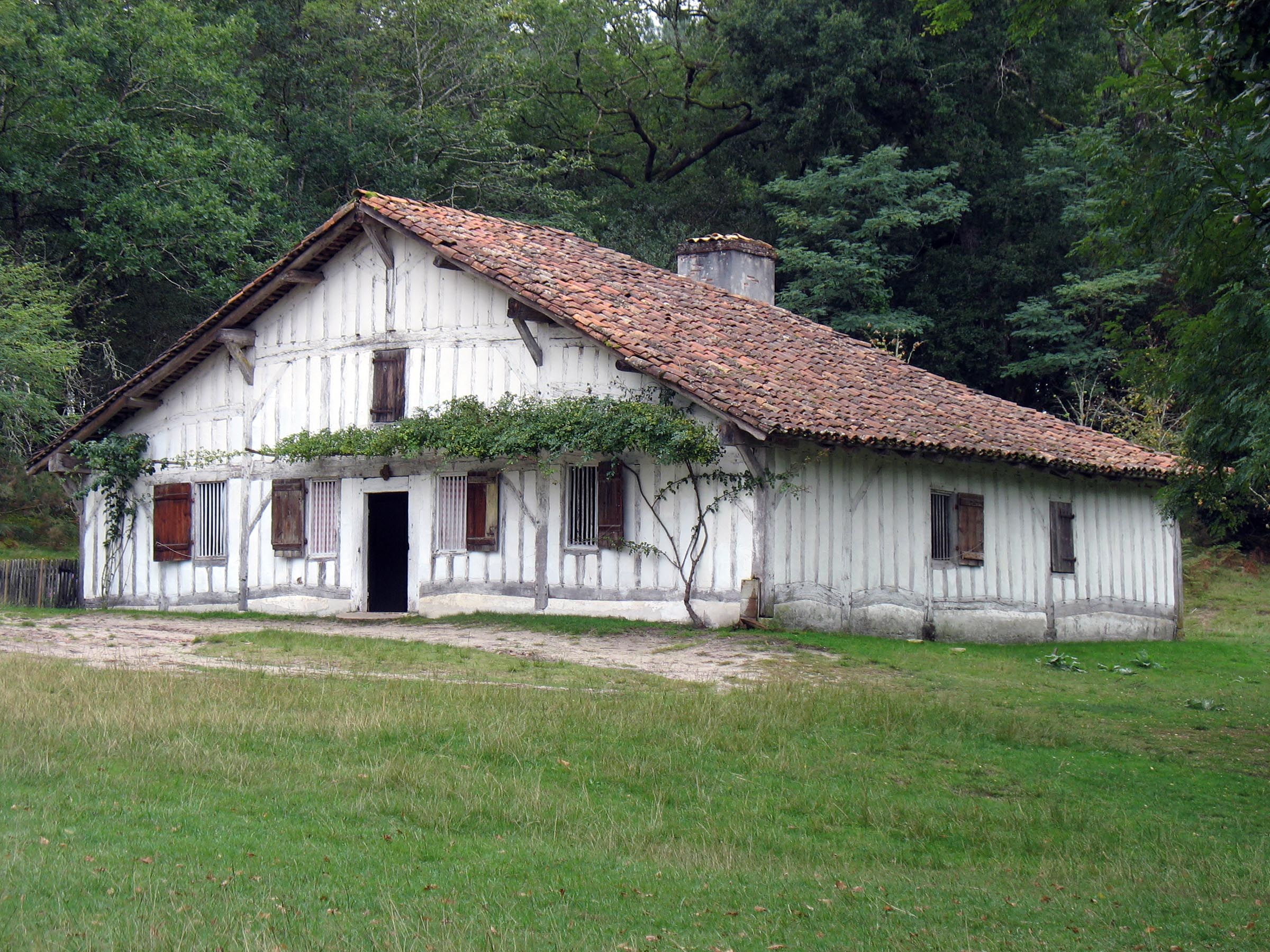 Maison du meunier à l'écomusée de la Grande Lande à Marquèze